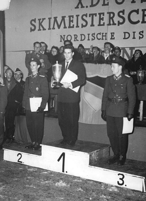 Zentralbild Gahlbeck 10.2.1959 X. Deutsche Skimeisterschaften Am 7. und 8.2.1959 fanden die X. Deutschen Skimeisterschaften in Lauscha statt. UBz: Siegerehrung: (1) Helmut Recknagel, Deutscher Meister im Spezialsprunglauf, Zweiter Harry Glass (2), Dritter Werner Lesser (3).